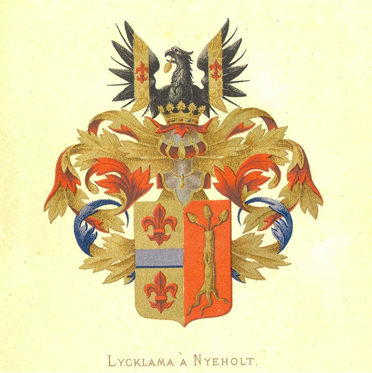 Wapen behorende tot de tak Lycklama à Nijeholt die is opgenomen in de Nederlandse adel.